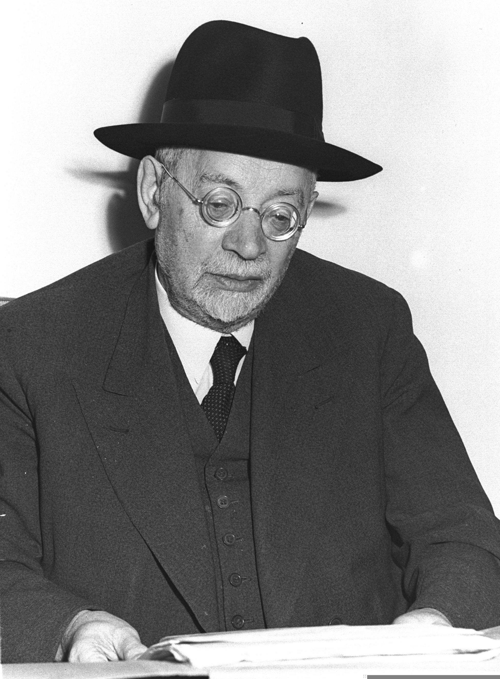 Yehuda Leib Maimon